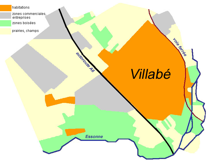 Carte de Villabé, Villabé, Essonne, France